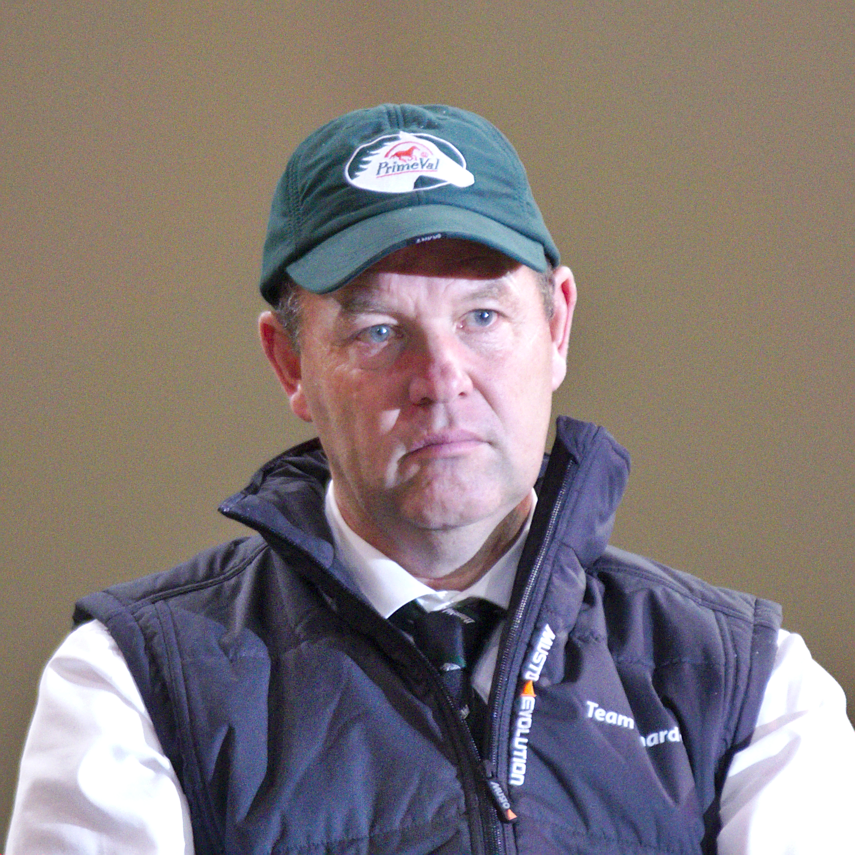 CHI Genève 2013 - 20131214 - Ijsbrand Chardon